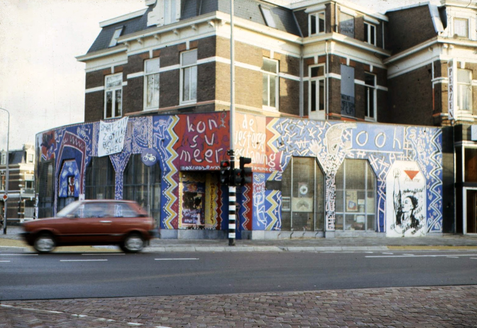 De Westland, St. Annastraat 1 Nijmegen, ca. 1985